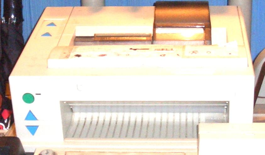 IBM Model 4 POS Printer